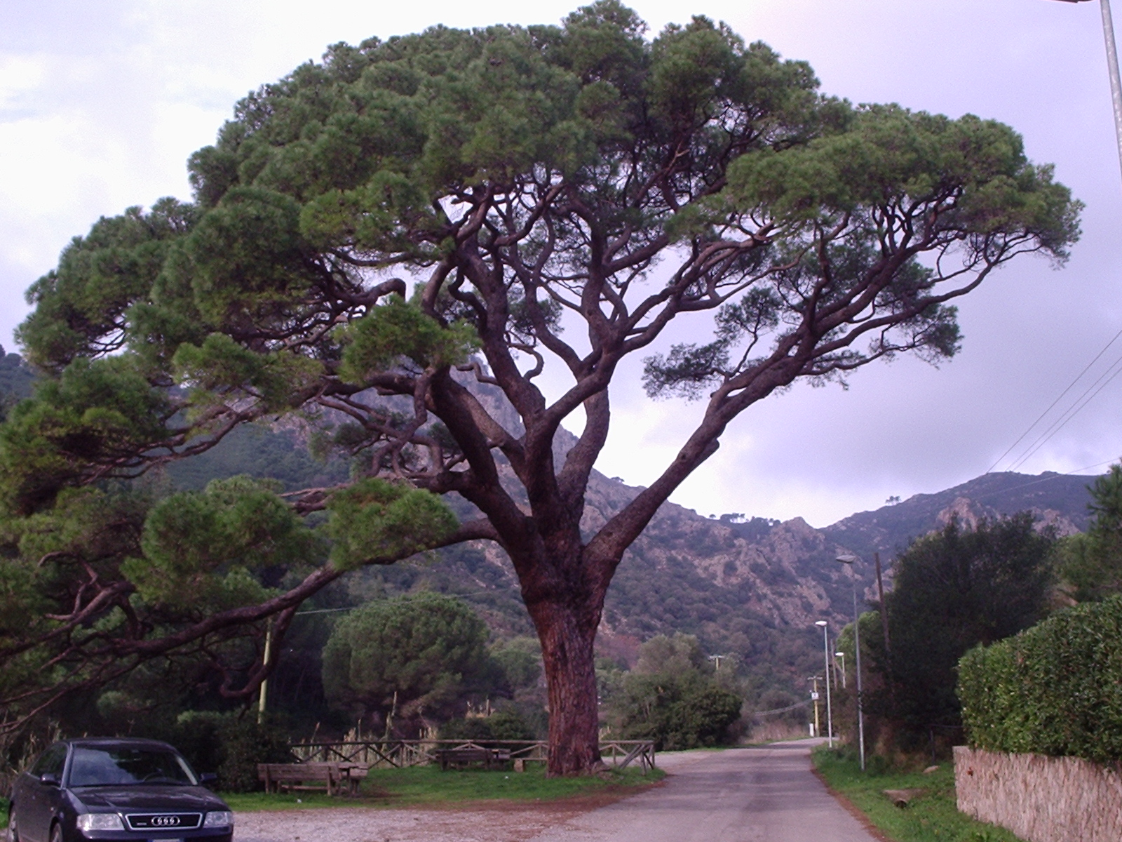 pino domestico monumentale di Monserrato all'Elba